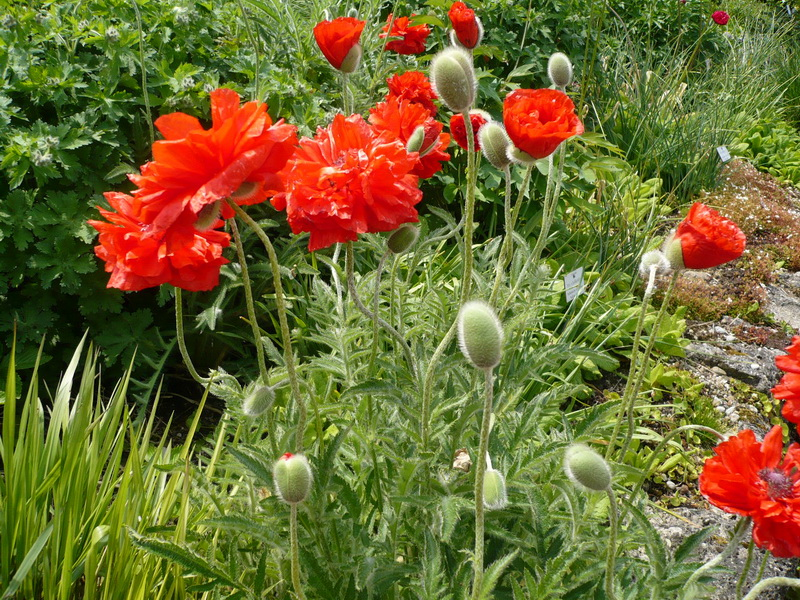 Papaveraceae, Papaver orientale 'Border Beauty', Türken Mohn